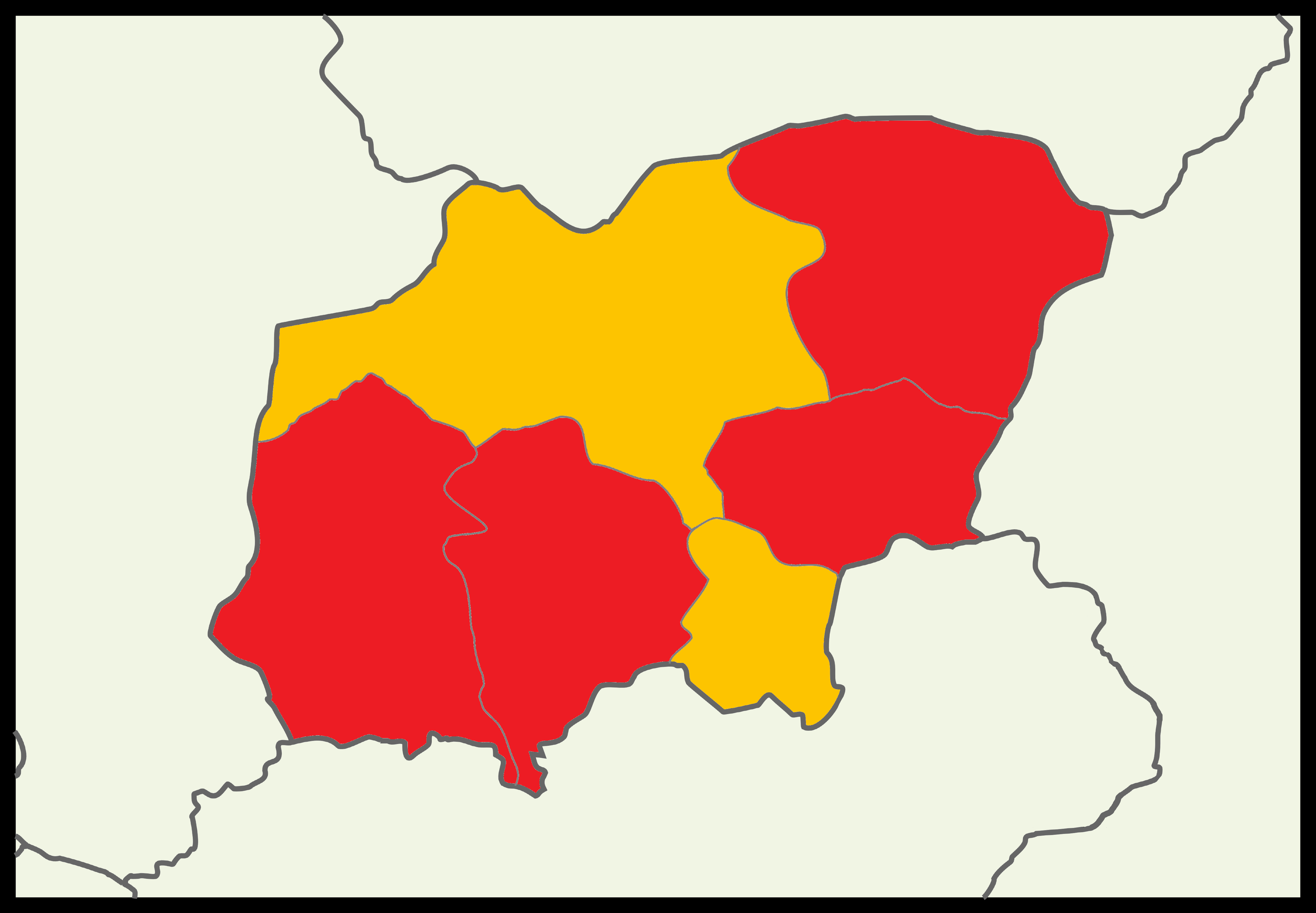 Uşak'ta 2014 Türkiye cumhurbaşkanlığı seçimi sonuçları